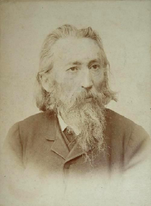 Portret Jana Matejki